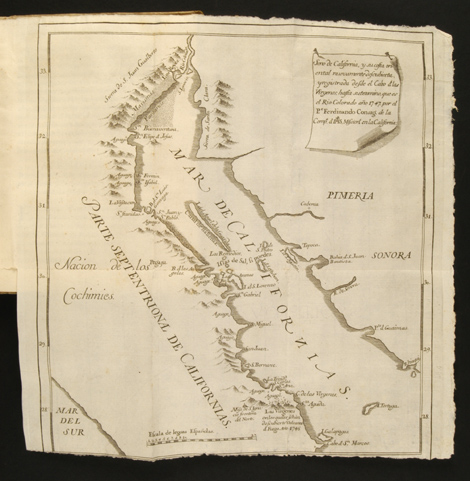 Karta Kalifornije i Baje Californije,Ferdinand Konščak